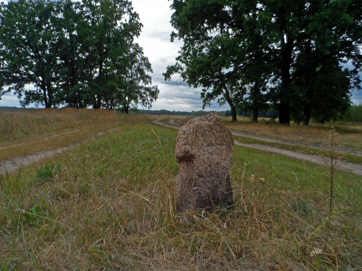 Дарапеевічы. Каменны крыж